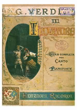 Обложка клавира